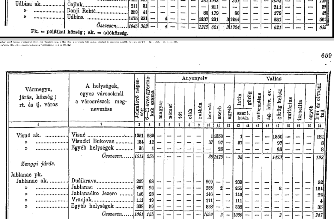 Popis stanovništva Kraljevina Hrvatska i Slavonija